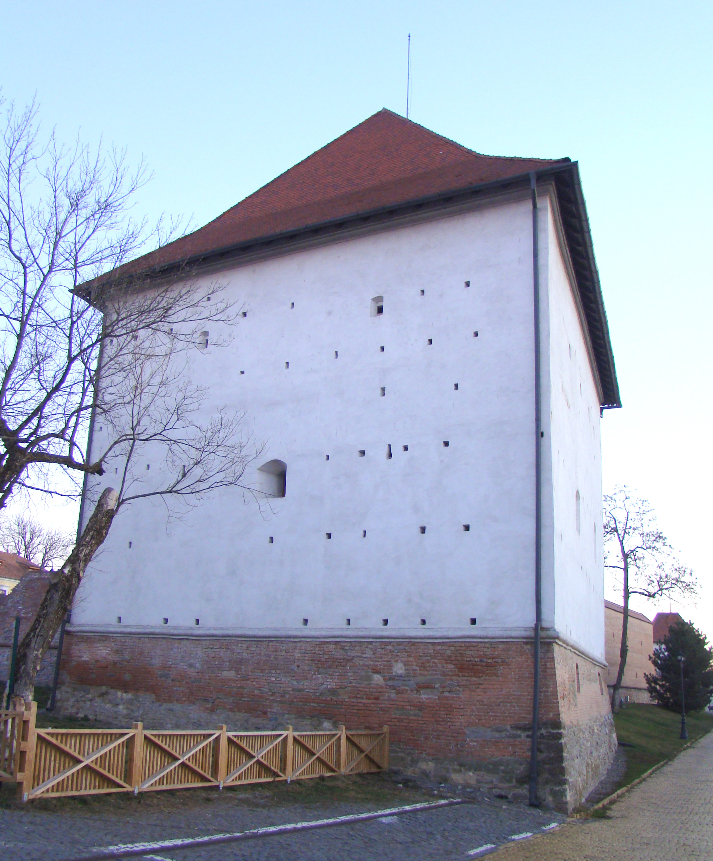 Ansamblul cetății medievale, municipiul Târgu Mureș, Piața Bernady György 5 sec. XV - XIX